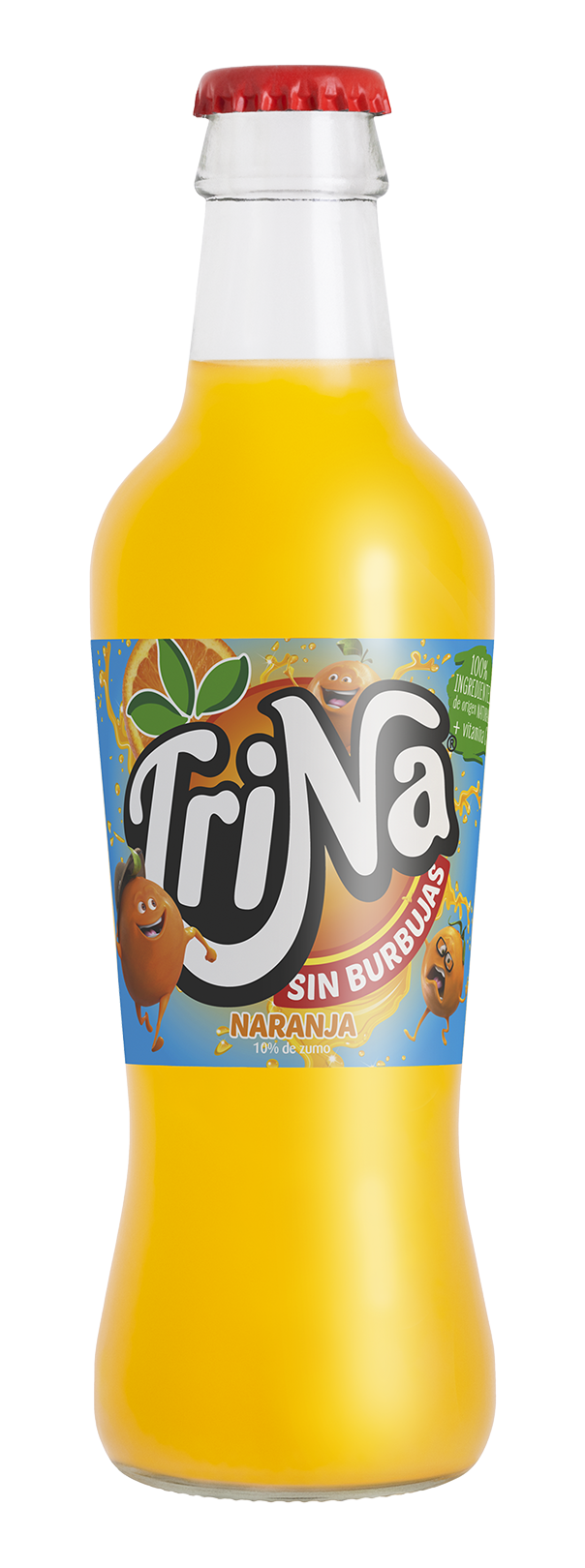 Botella de TriNa naranja de 27,5 cl